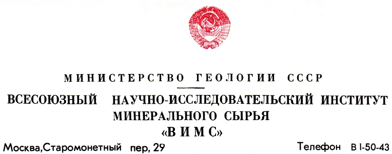 Бланк ВИМС в 1960-х годах